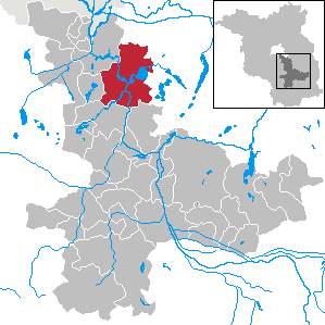 Heidesee in Brandenburg (Country) - District Dahme-Spreewald